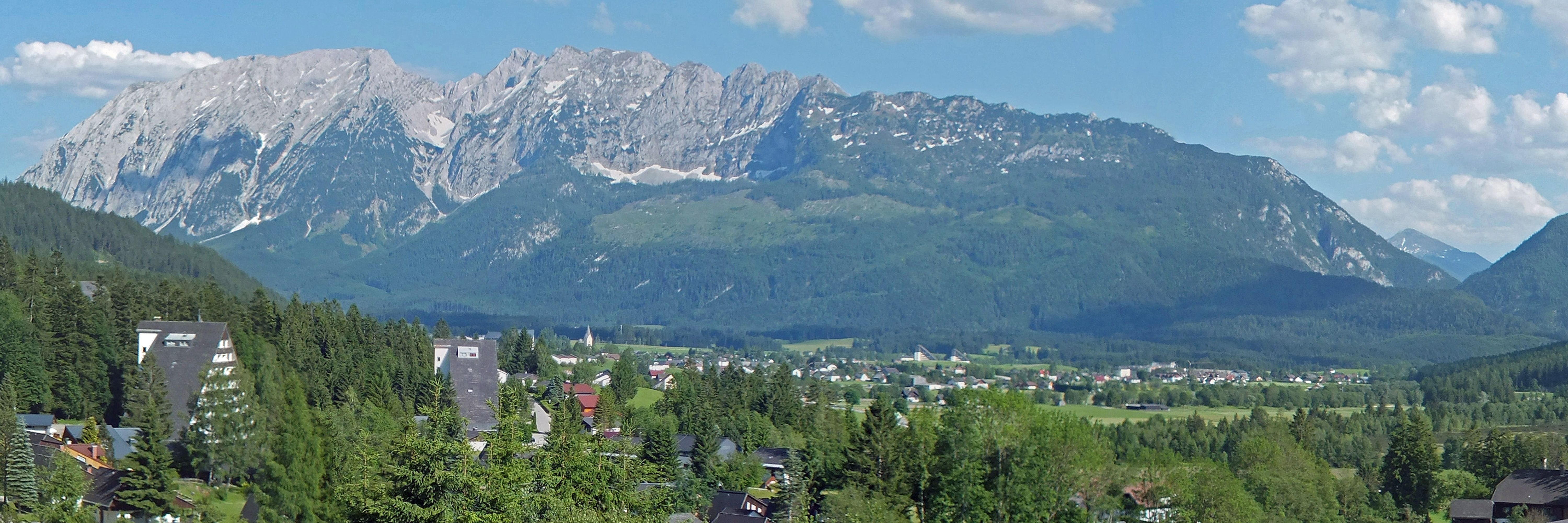 Bad Mitterndorf mit dem Grimming von der Sonnenalm aus gesehen.